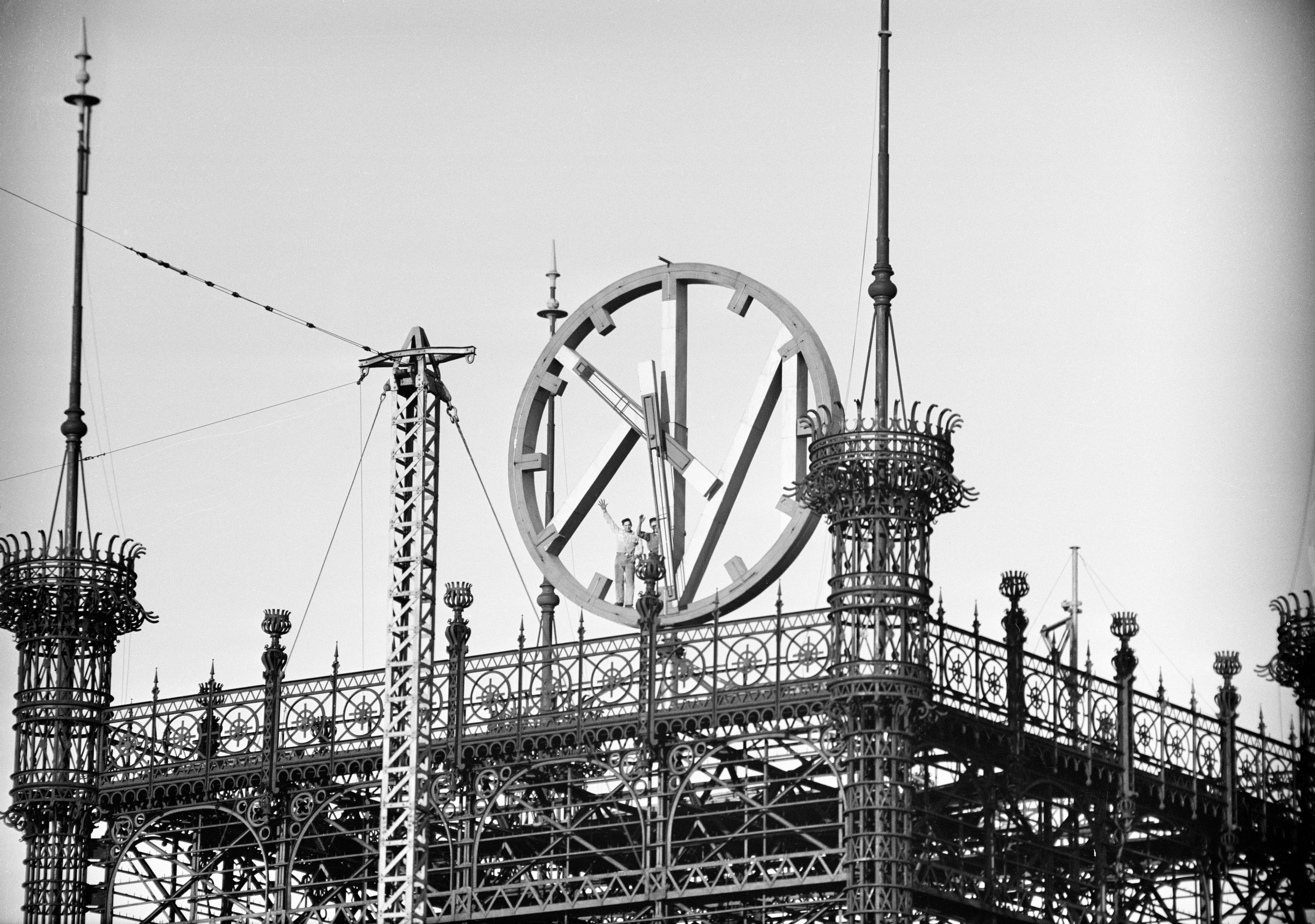 Malmskillnadsgatan 32, Telefontornet. NK-klockan som ska flyttas till vid tillfället obestämd plats. Kurt Agesson och William Bood vinkar från klockan